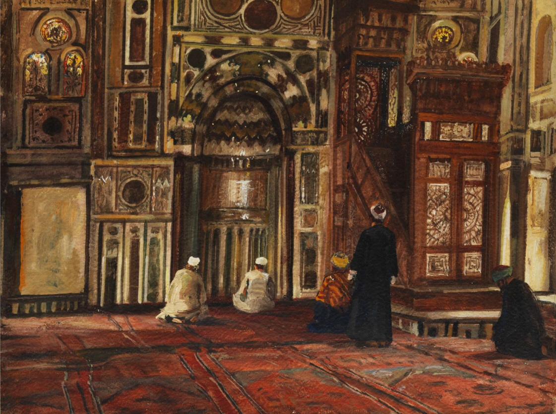 Georg Macco: Inneres der Al-Mu'Ayyad-Moschee in Kairo, Öl auf Karton, 38,8 x 51 cm